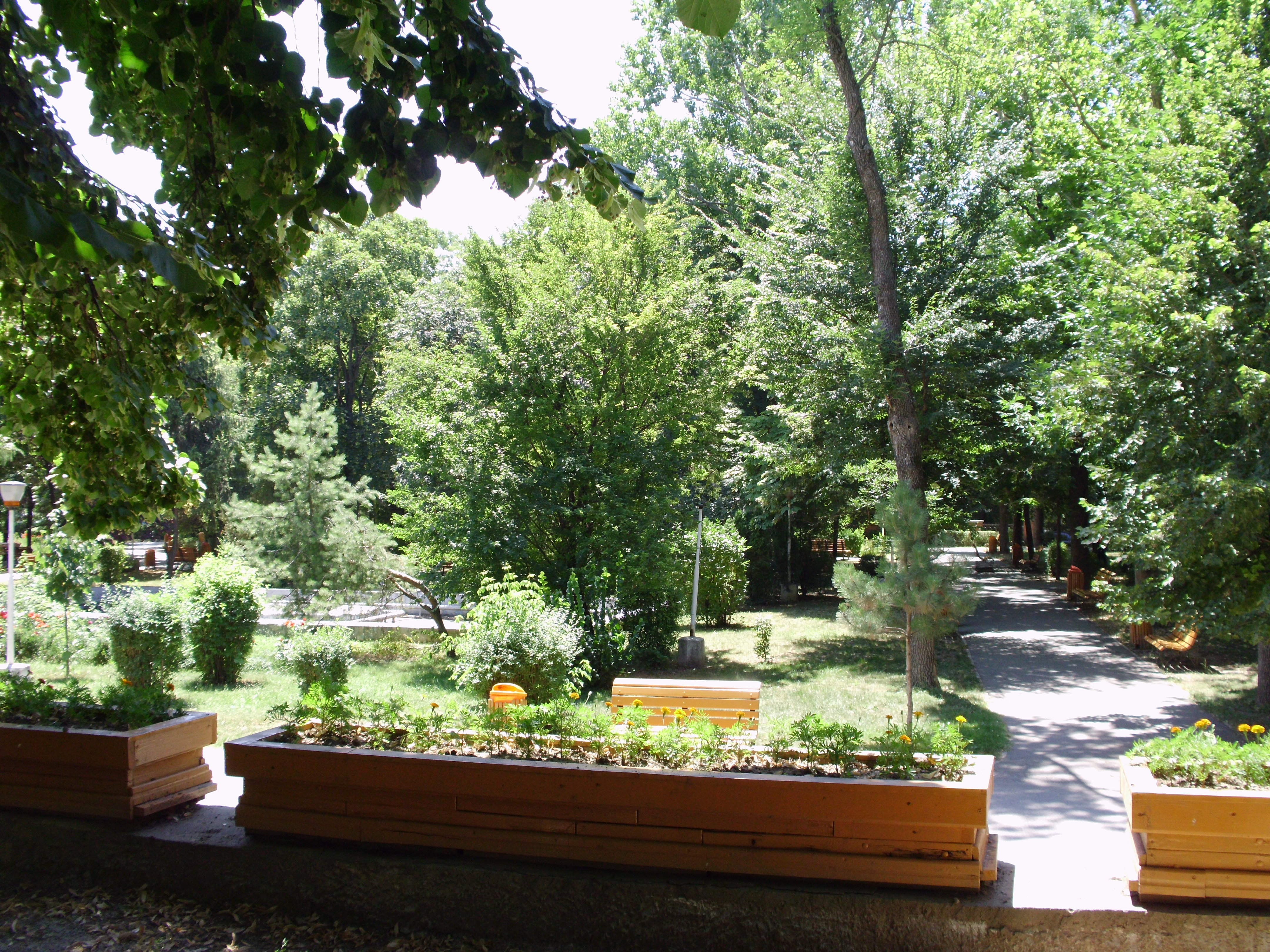 Ansamblul urban "Parcul Alei, cu imobilele limitrofe"